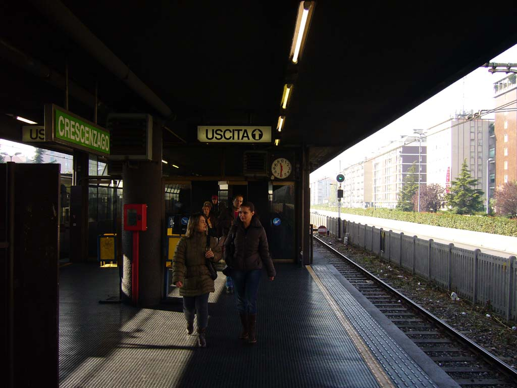 La fermata Crescenzago della metropolitana di Milano